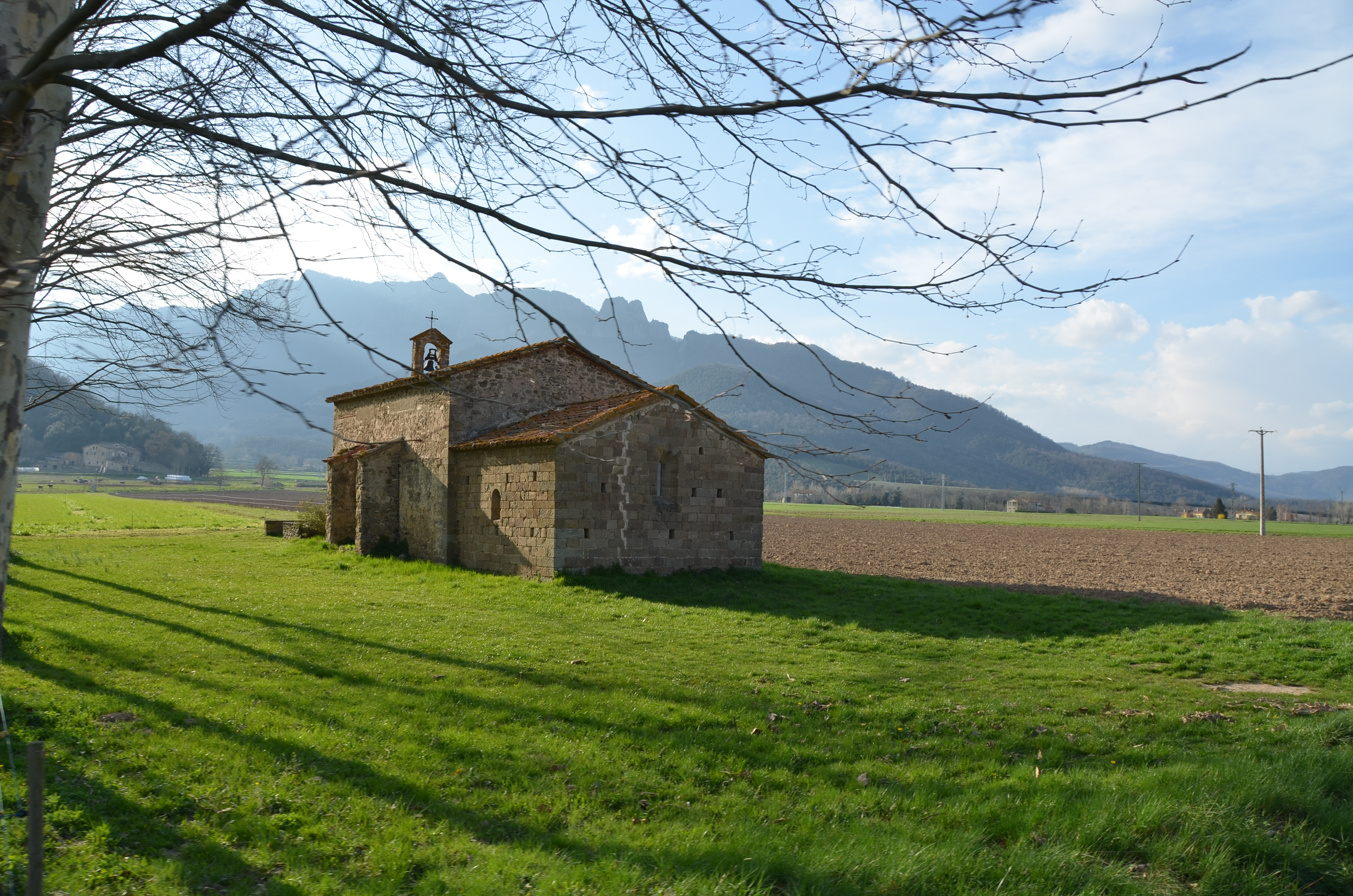 ermita de Sant Quintí